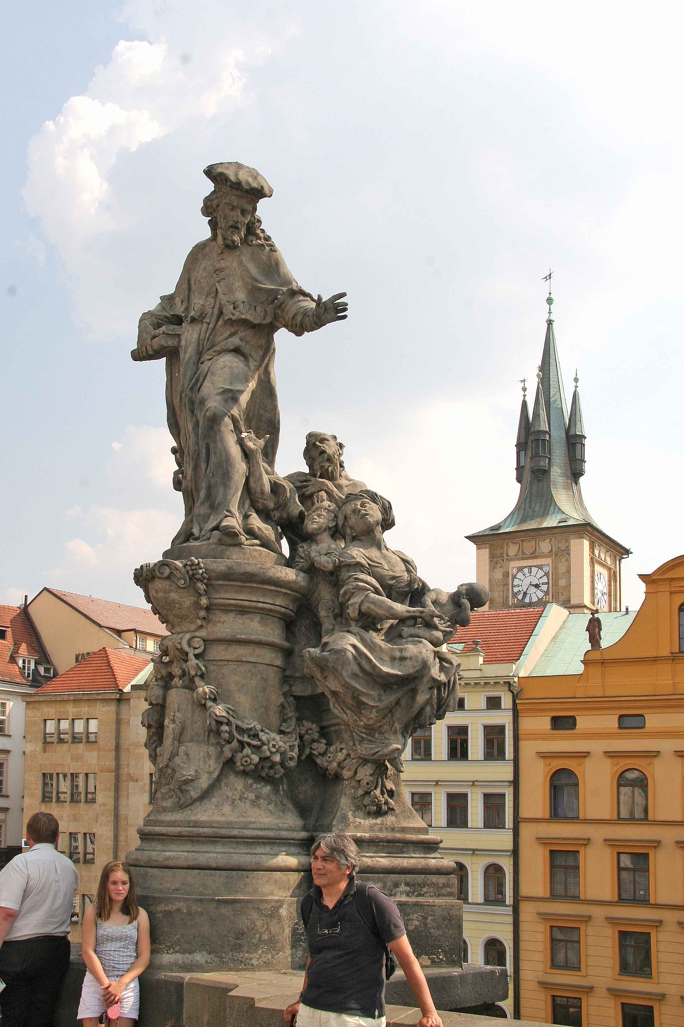 Sousoší Svatého Iva na Karlově mostě